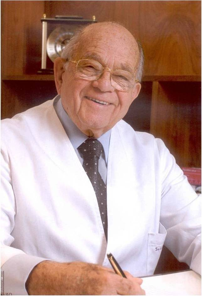 foto del Sr. Klaus Pförtner